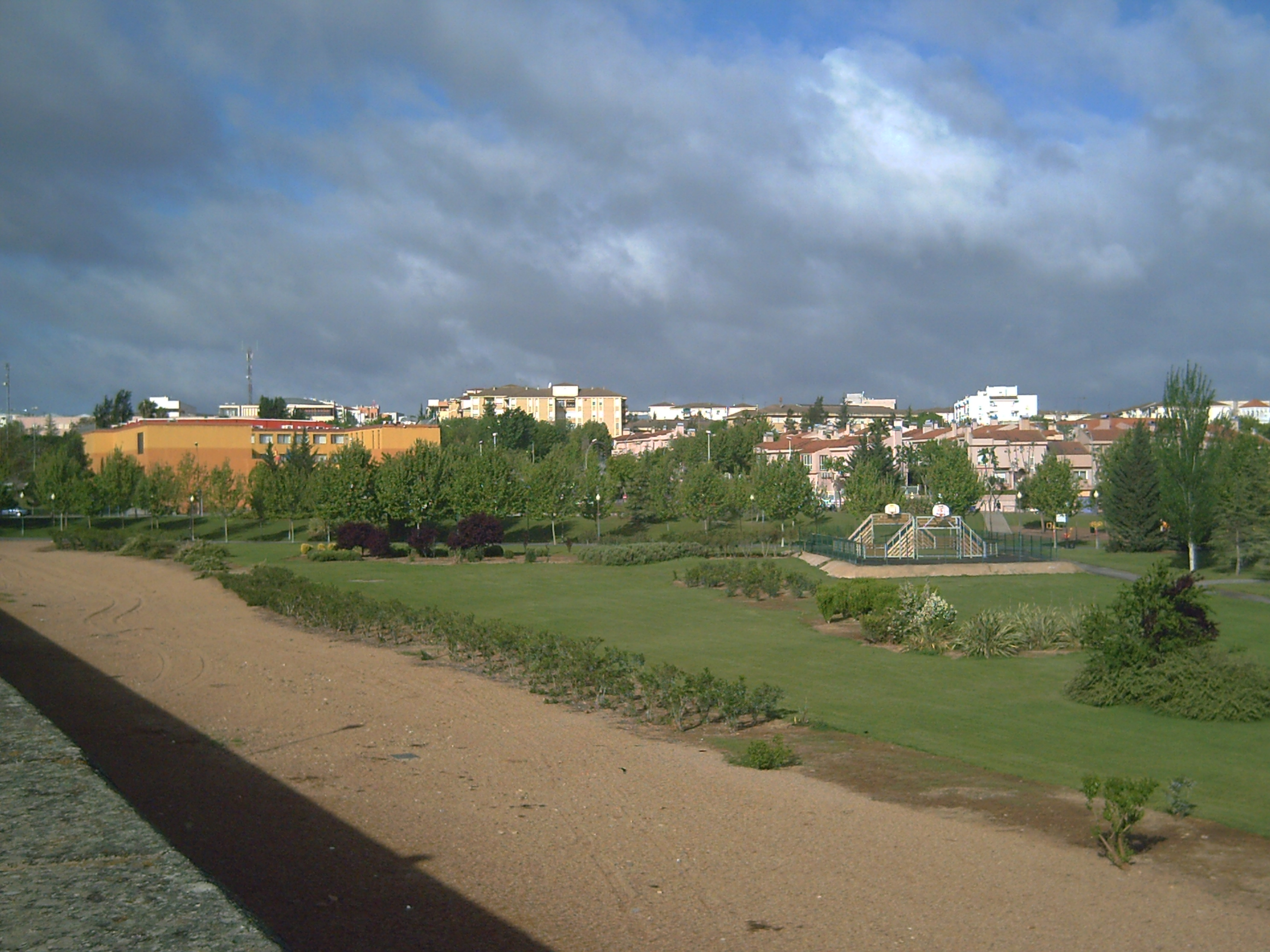 Polígonu resiencial Nueva Ciá, en Méria